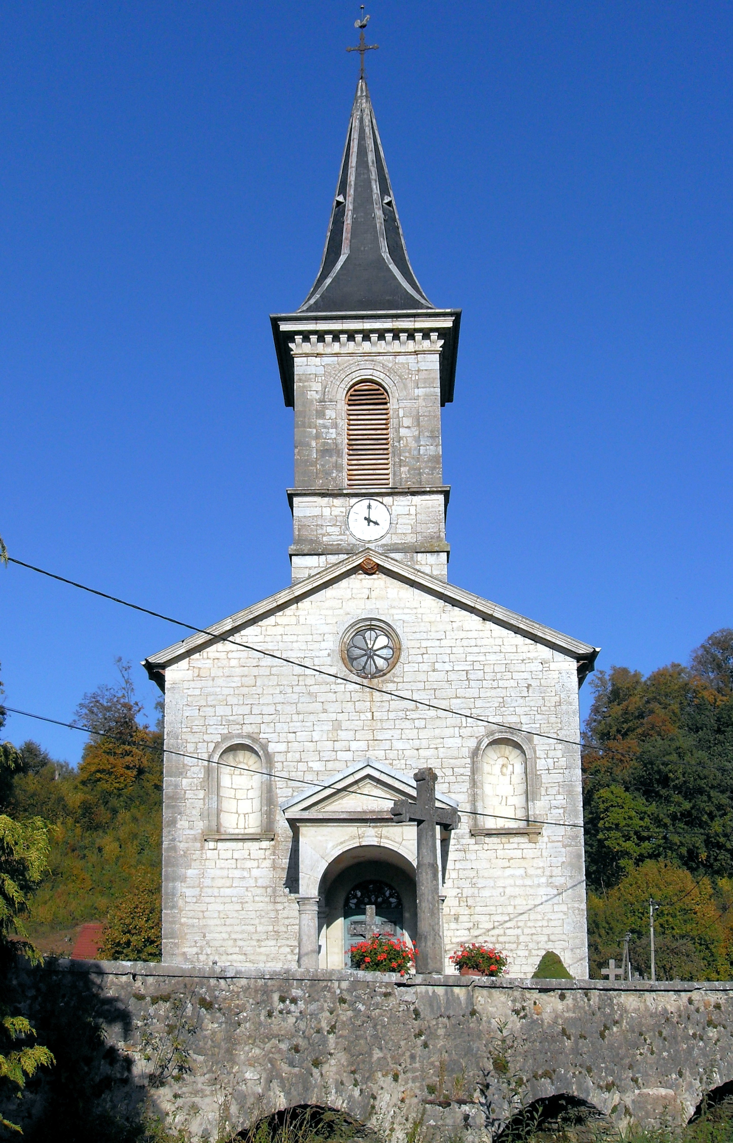 L'église Sainte-Agathe à Courcelles